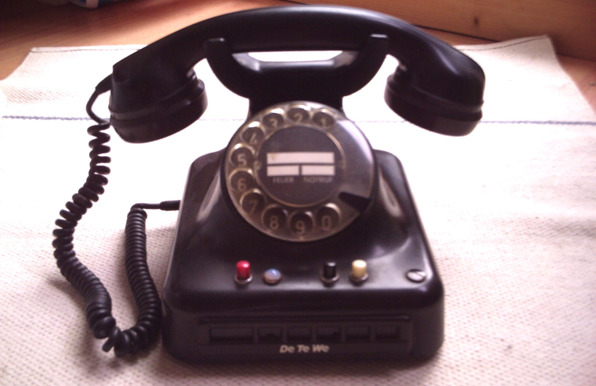 Fernsprech Nebenstellenanlage, Tischgerät mit Sonderfunktionen